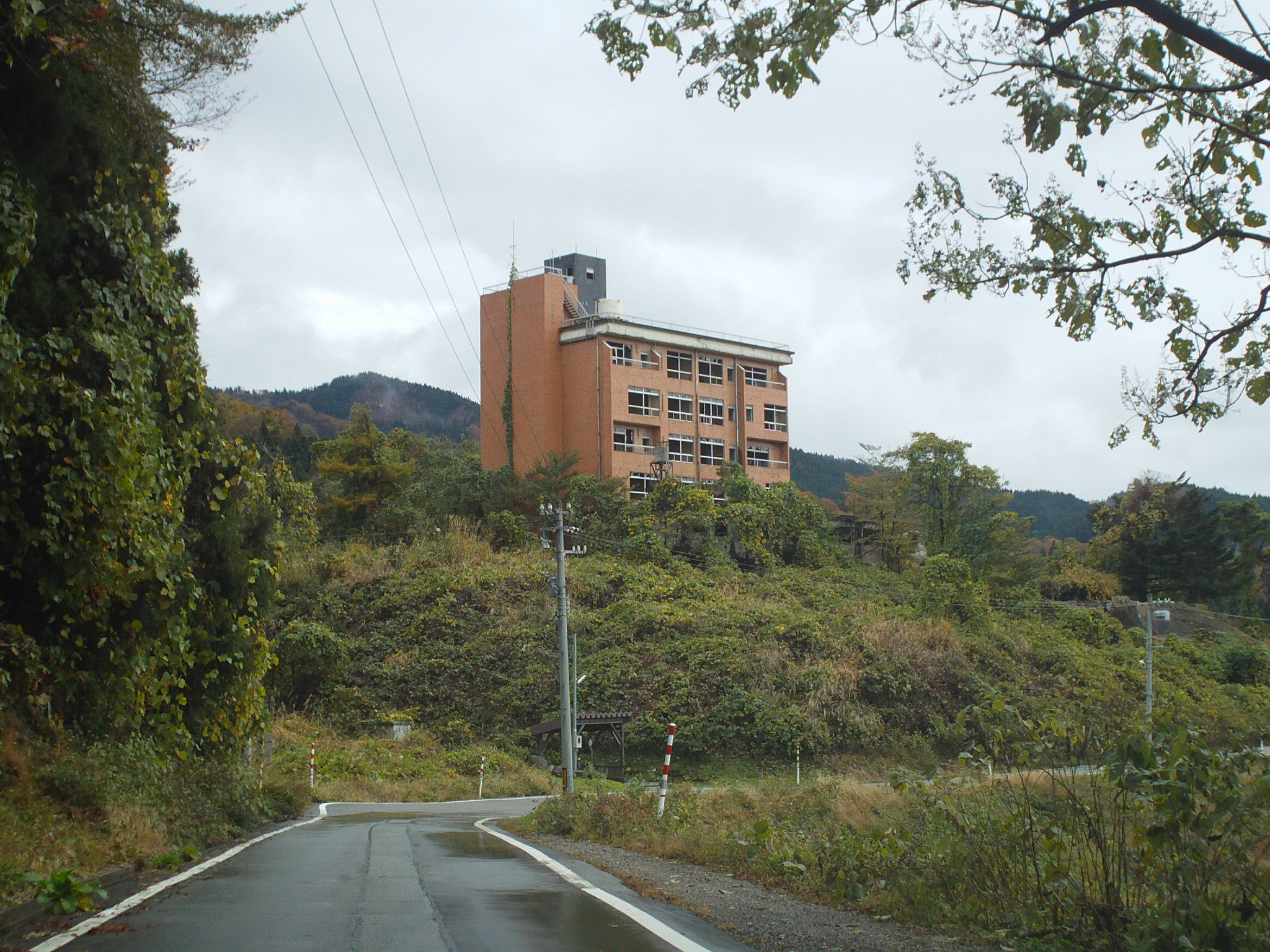 富山県魚津市、坪野鉱泉